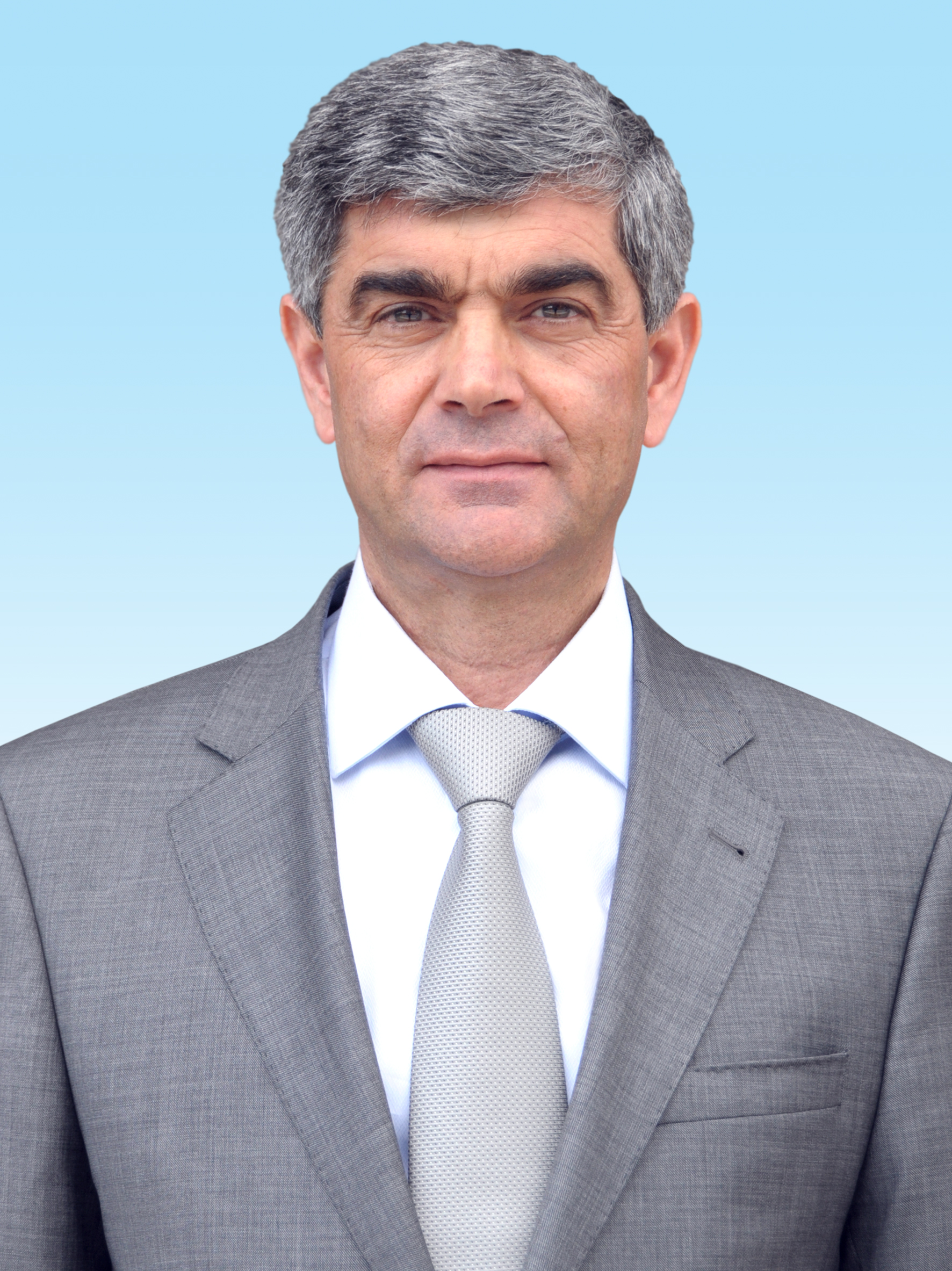 Le major-général de l'armée du Haut-Karabakh, l'Heros de l'Artsakh